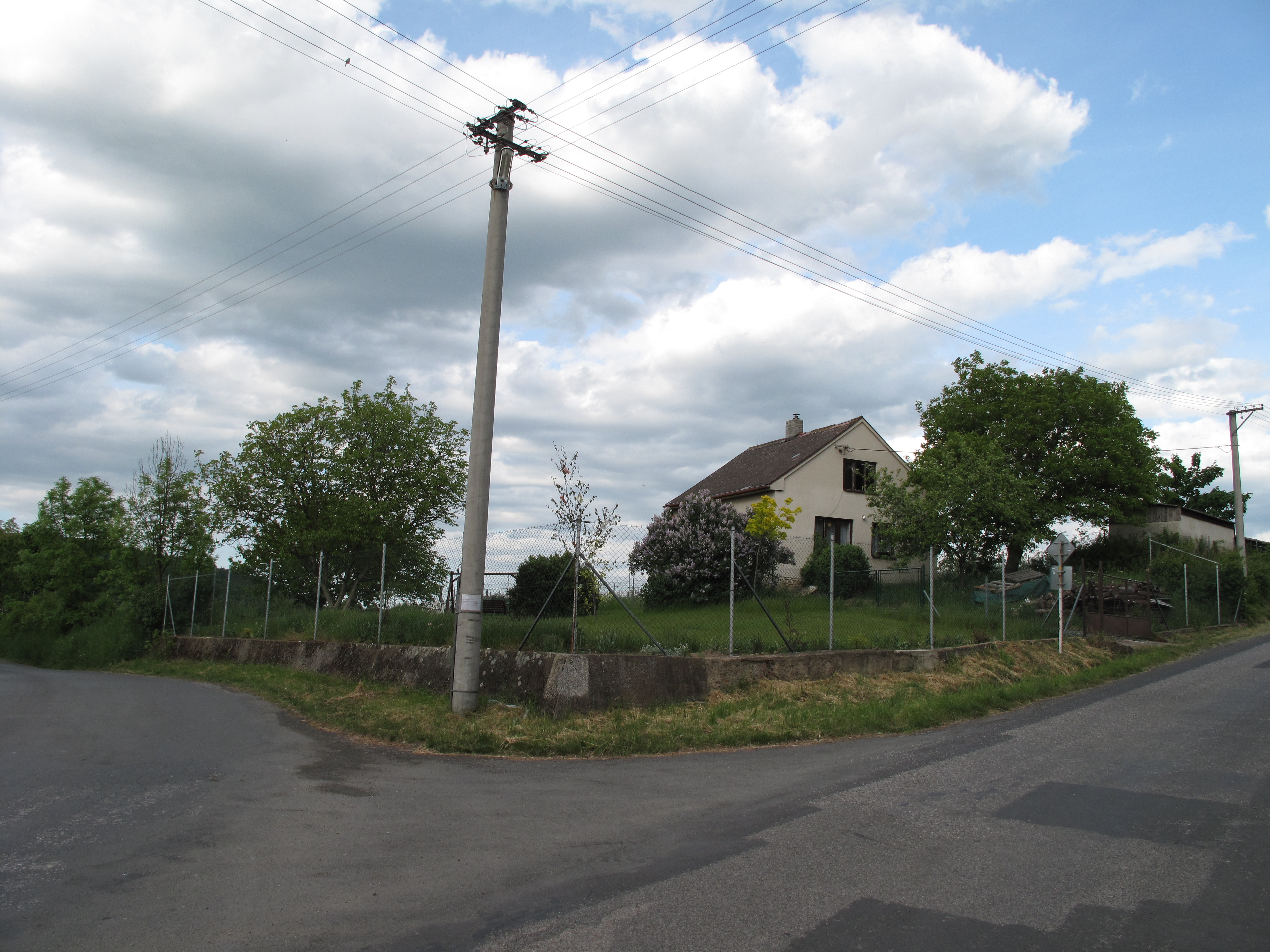 Dům v Nových Dvorech. Okres Beroun, Česká republika.